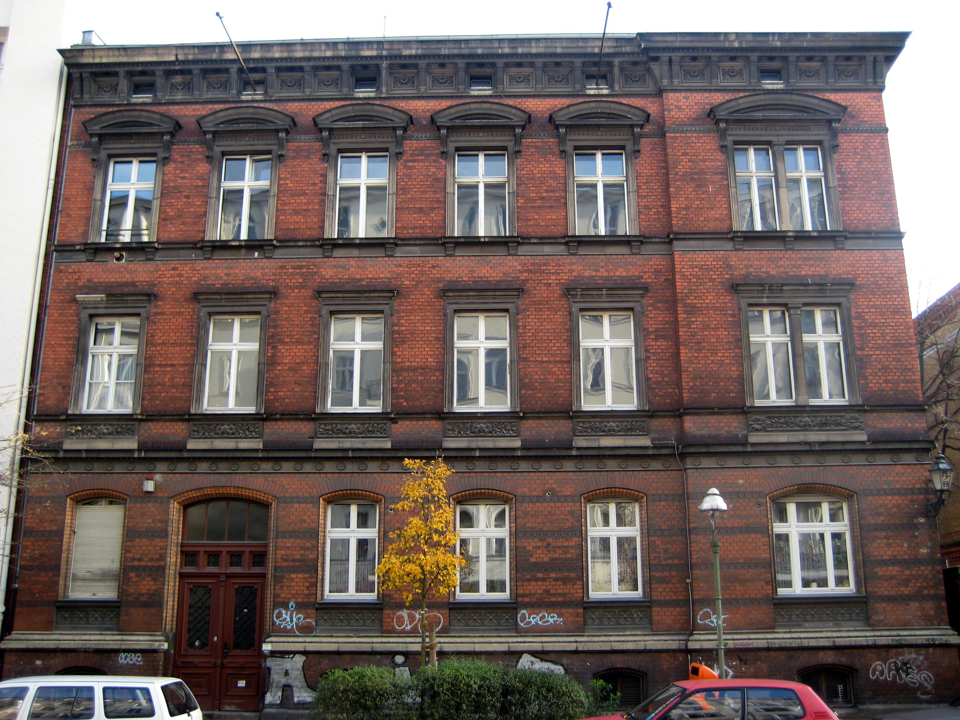 Teachers building at the 144., 176. und 184. Gemeindeschule (today Friedrich-Ludwig-Jahn-Oberschule) in Berlin-Kreuzberg, a landmarked building; built in 1888-1890 by H. Blankenstein and K. Frobenius.